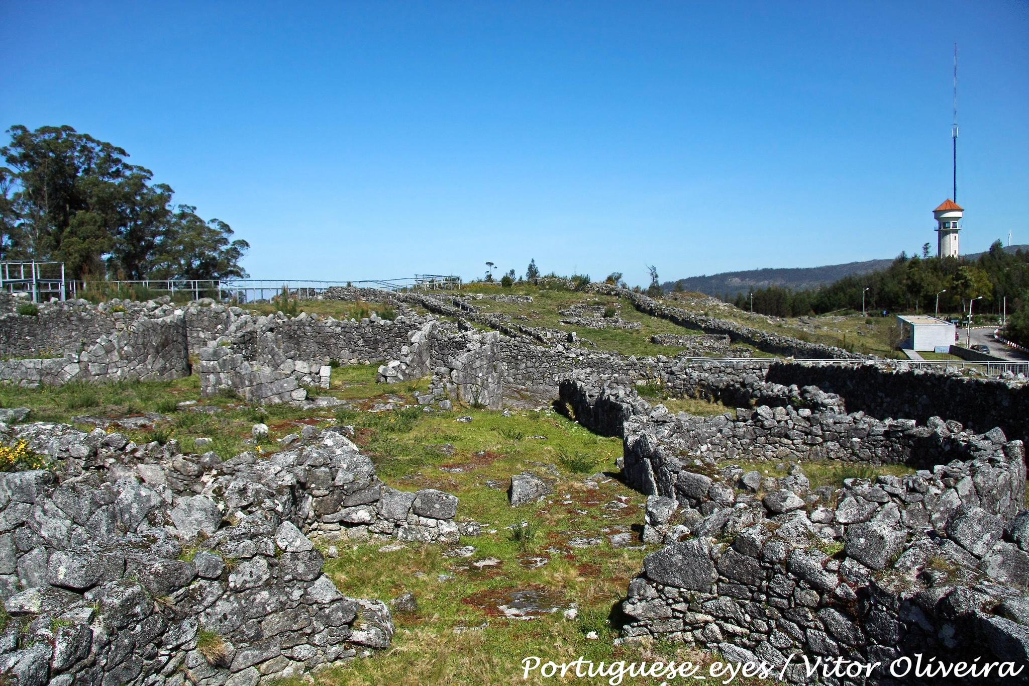 A Citânia de Santa Luzia, conhecida localmente como "cidade velha", é um dos castros mais conhecidos do Norte de Portugal e, sem dúvida, um dos mais importantes para o estudo da Proto-História e da Romainzação do Alto Minho. A sua localização estratégica permitia-lhe não só dominar vastas áreas da zona litoral ribeirinha, como também controlar o movimento das entradas e saídas na Foz do Lima que, na Antiguidade, seria navegável em grande parte do seu curso. O Povoado apresenta características muito próprias, principalmente ao nível das estruturas arquitectónicas, com destaque para o aparelho poligonal, utilizado em algumas casas, que apresentavam uma planta circular com um vestíbulo ou átrio e que, em alguns casos, albergavam fornos de cozer pão. See where this picture was taken. [?]